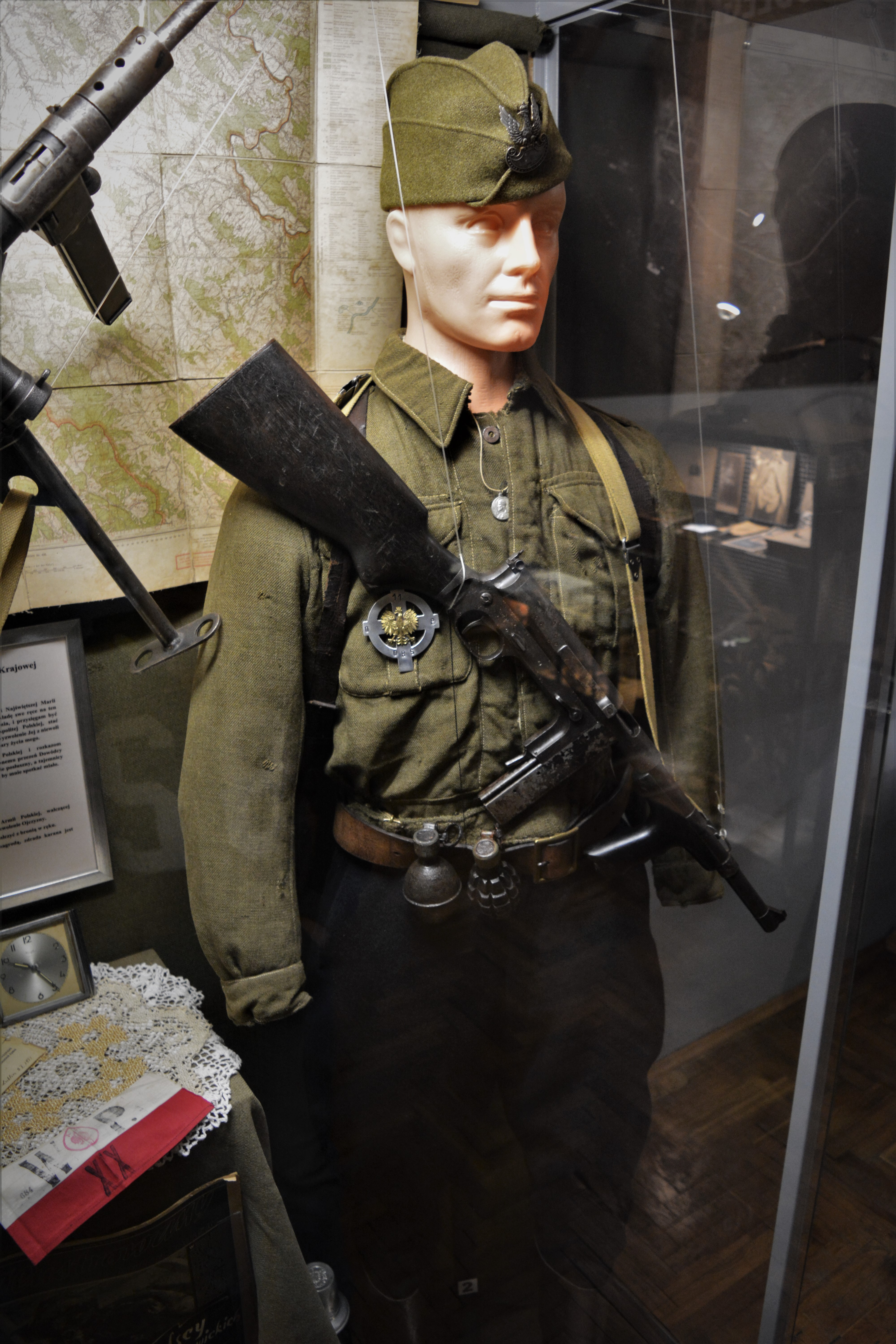 Wizualizacja przedstawiająca żołnierza OP-11. Prywatne Muzeum Podkarpackich Pól Bitewnych w Krośnie.